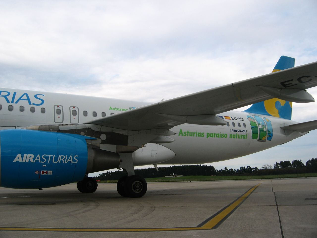 Air Asturias